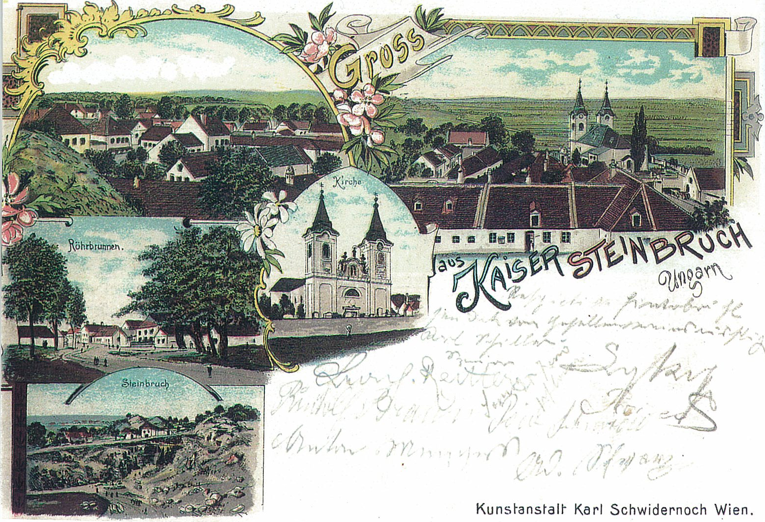 Kai_-_Karte, Postkarte aus Kaisersteinbruch